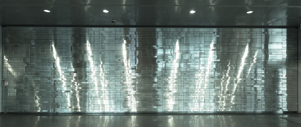 Lielā Ziedotāju siena LNB vestibilā. Foto - Kristians Luhaers